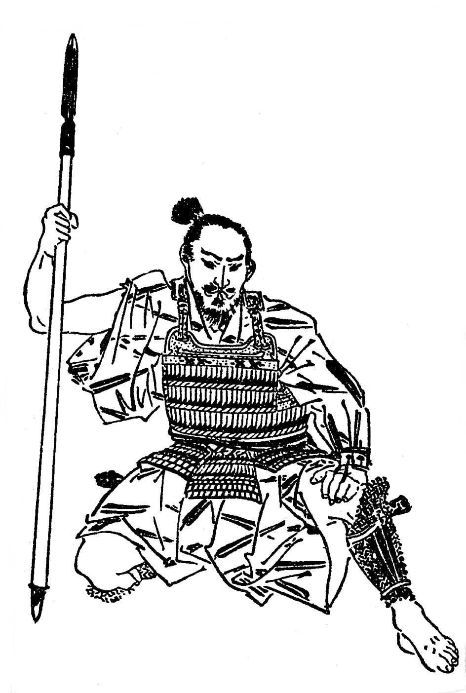 伊勢義盛。源義経の郎党。平安時代末期 - 鎌倉時代初期の武士。／江戸時代『前賢故実』より。画：菊池容斎